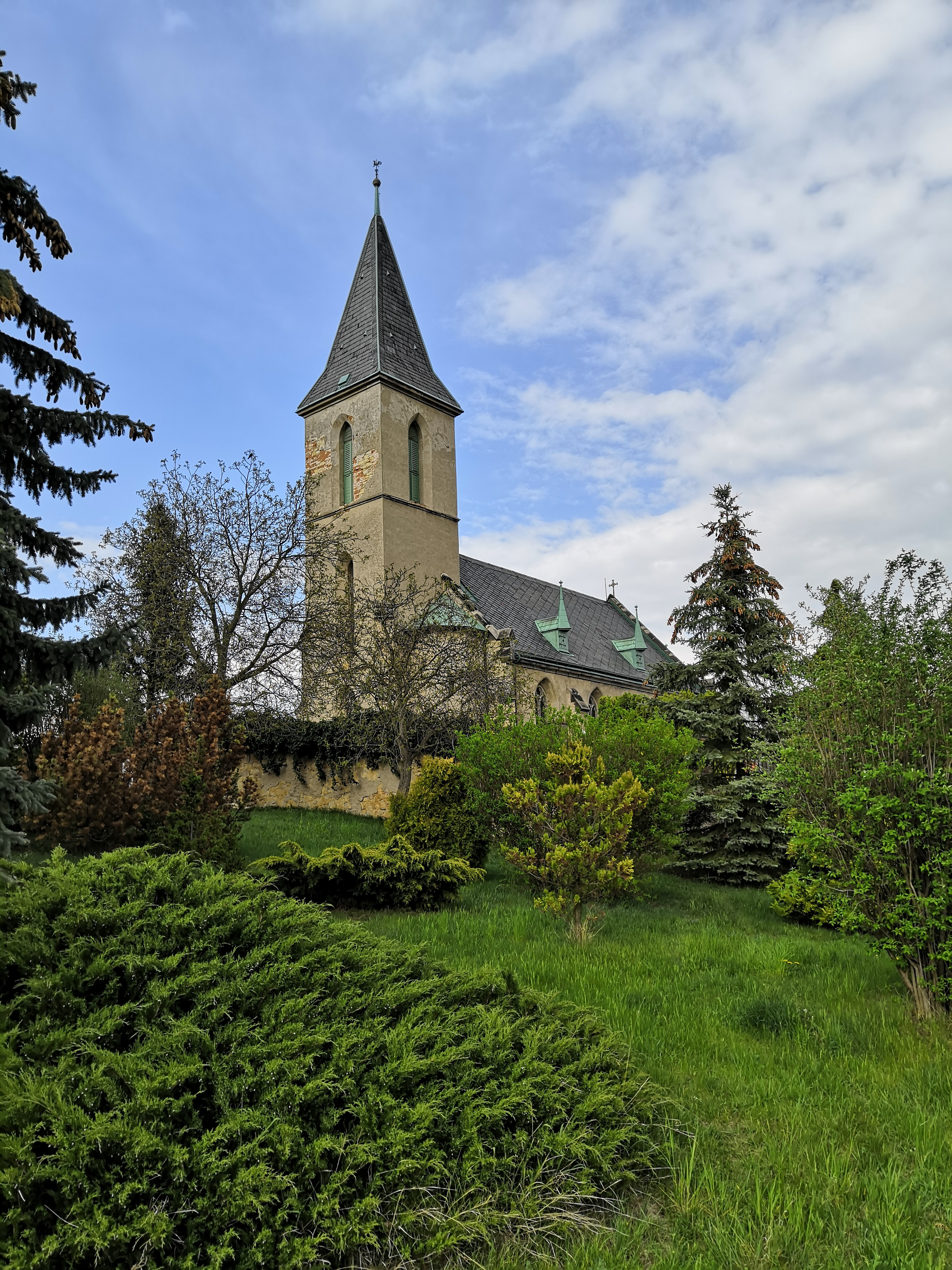 Páleč, kostel Narození Panny Marie